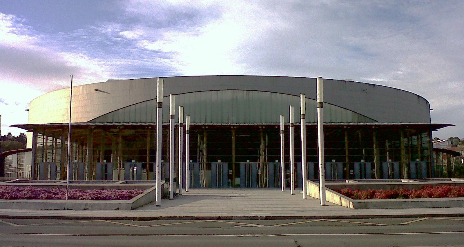 Stade omnisports couvert "Multiusos Fontes do Sar" à Saint-Jacques-de-Compostelle (Espagne)